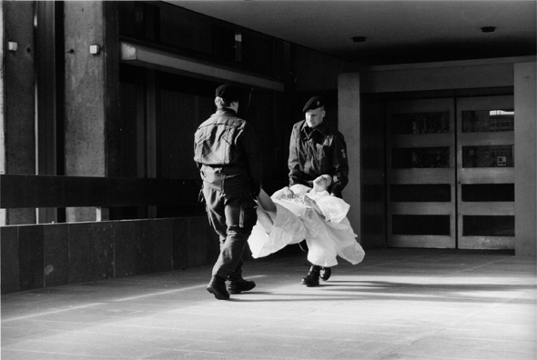 Michaela Caspar wird von Polizisten aus der Hauptstelle der Deutschen Bank in Berlin herausgetragen. Foto von Sebastian Hoppe.